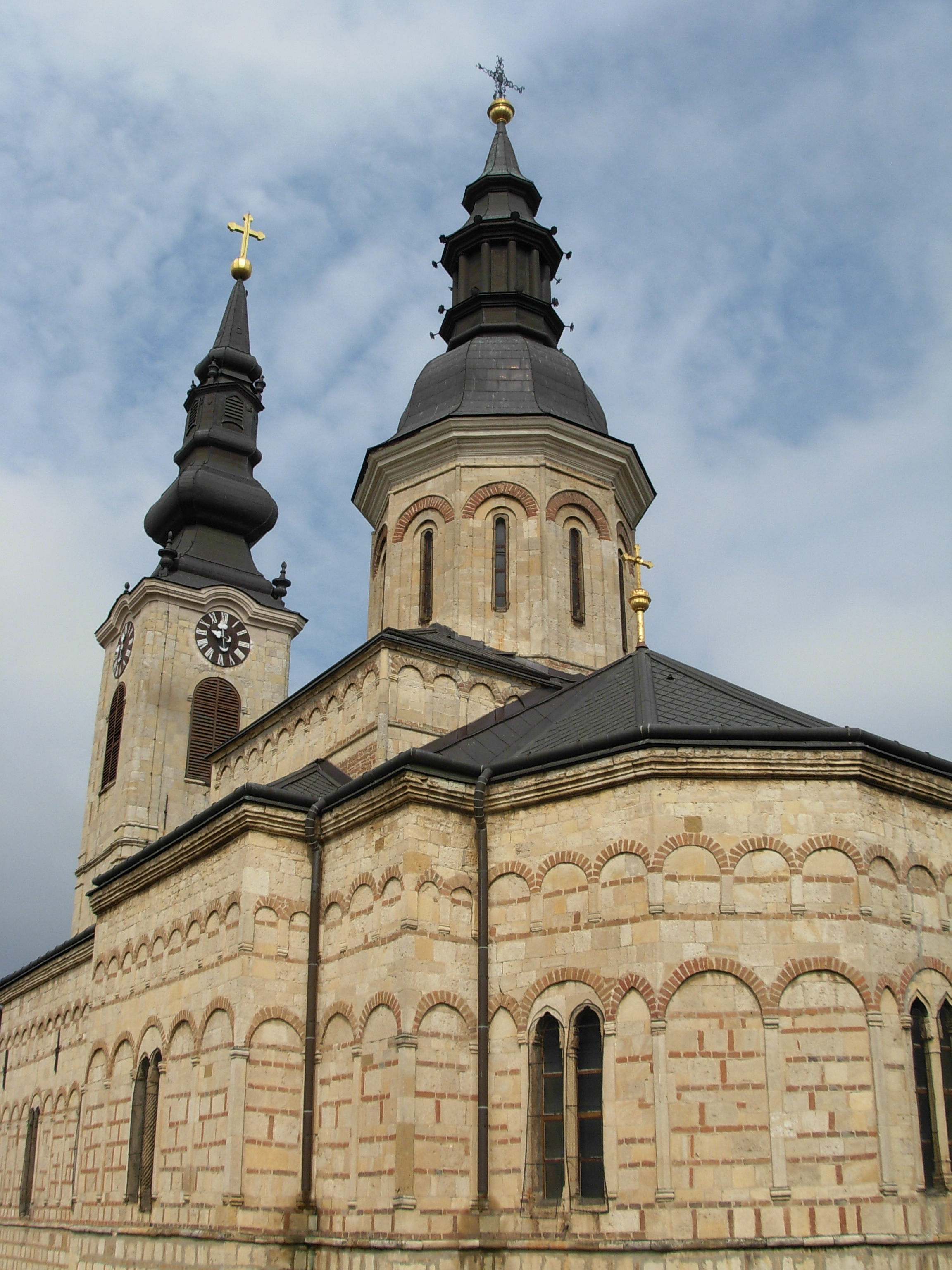 Zadnja strana crkve Rođenja presvete Bogorodice u Sremskoj Kamenici.